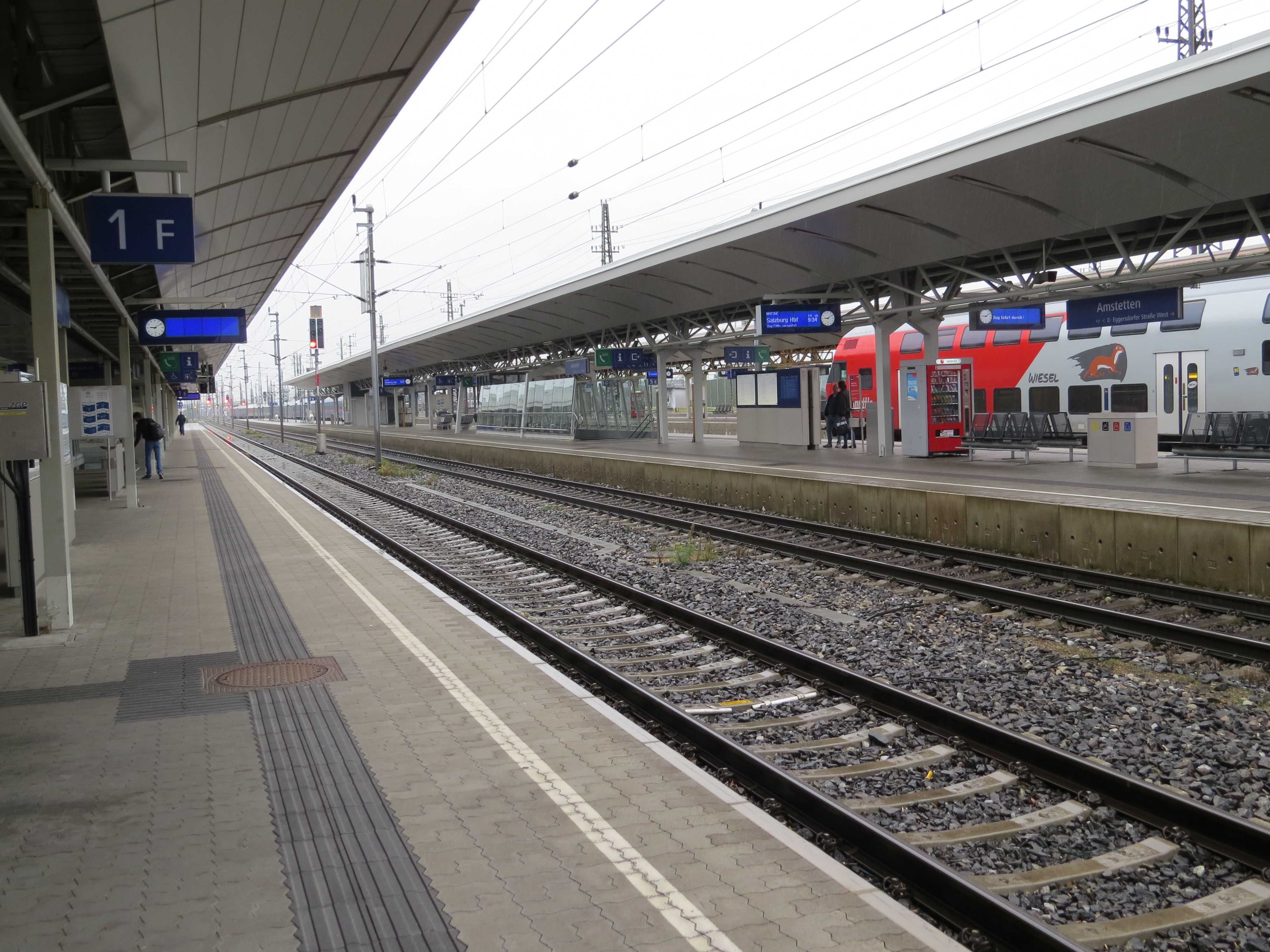 Bahnhof Amstetten